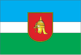 Прапор Олевського району